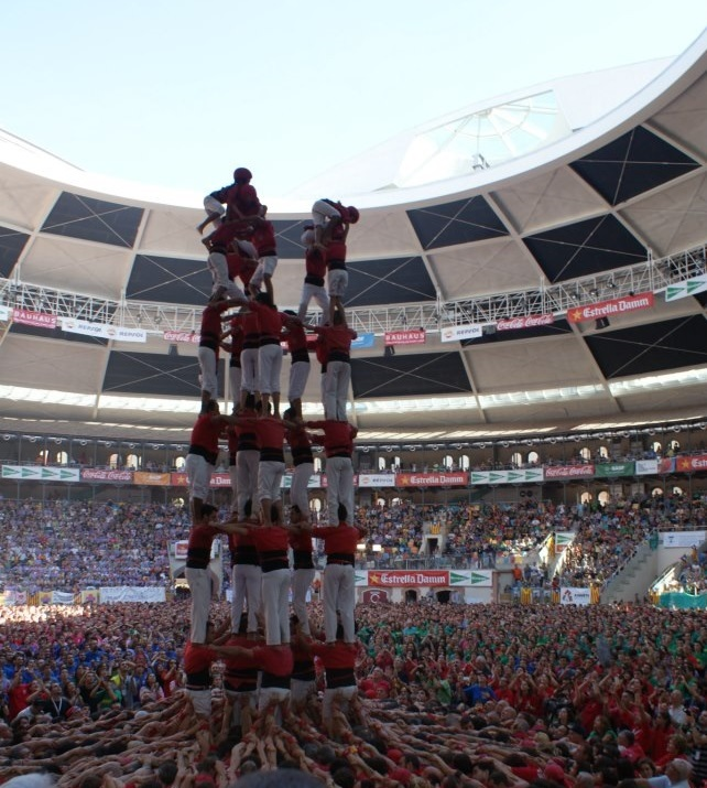 Pirmer 9d8 de la CJXV.